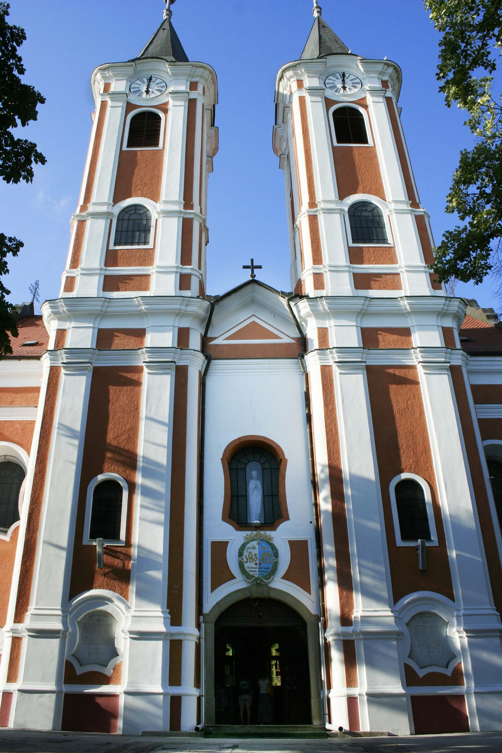 Máriagyüd templom